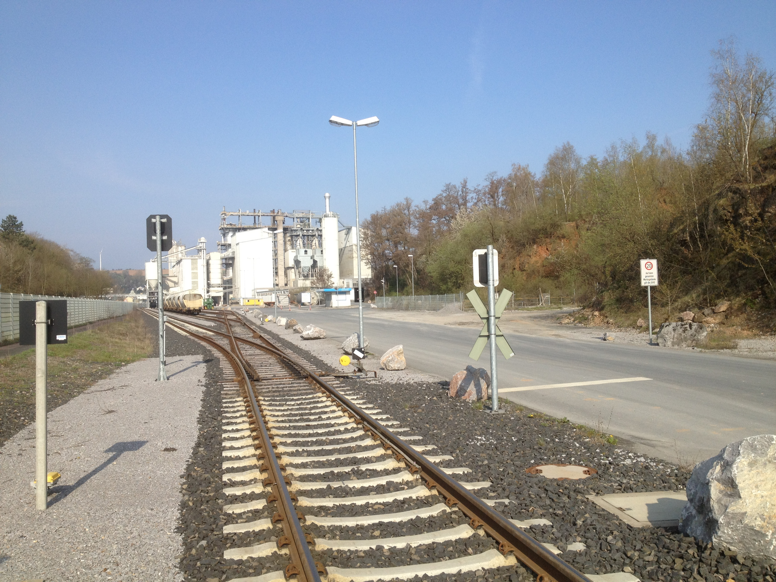 Der Gleisanschluss des Kalkwerkes Steeden der Schaefer Kalk ist über eine Anschlussbahn (ehem Kerkerbachbahn) an den Bahnhof Kerkerbach angeschlossen. Täglich verkehr eine Rangierfahrt zwischen Bahnhof und Werk.